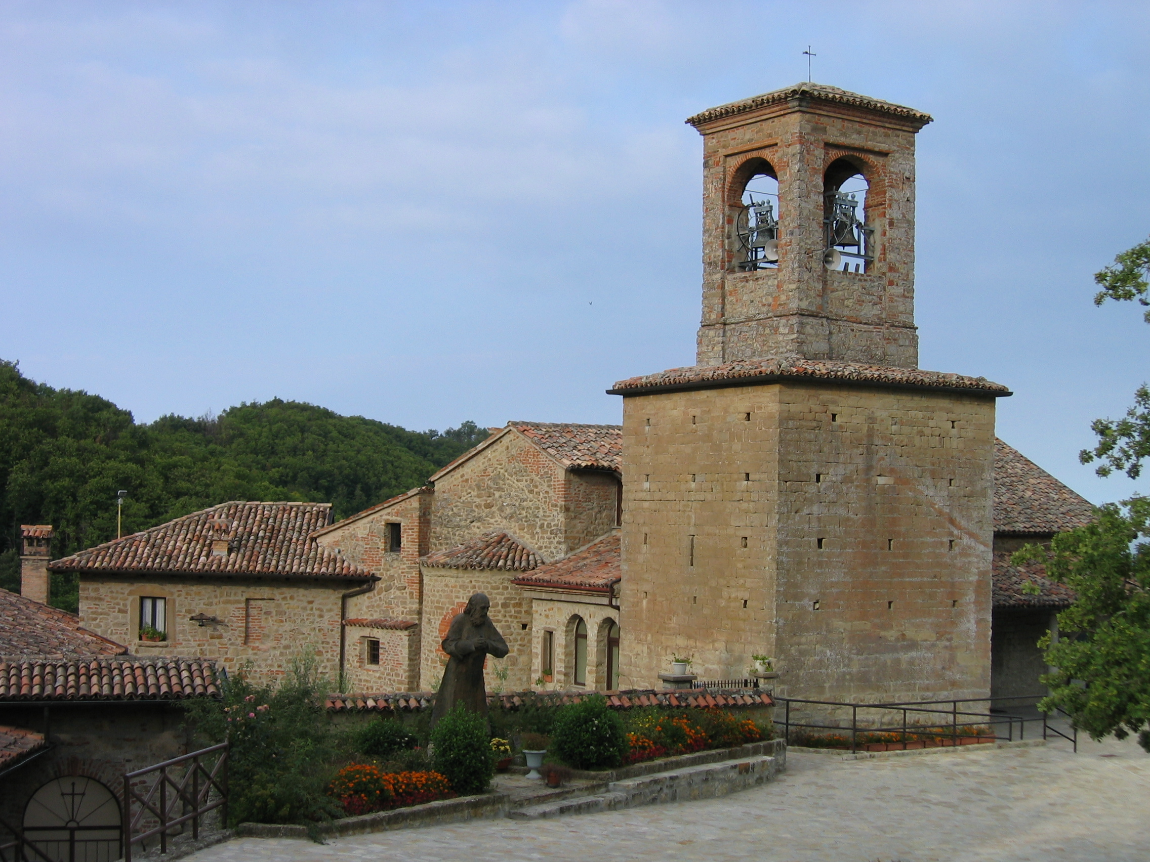 Eremo di Sant'Alberto di Butrio (Pavia), affidato agli Eremiti della Divina Provvidenza fondati da San Luigi Orione.